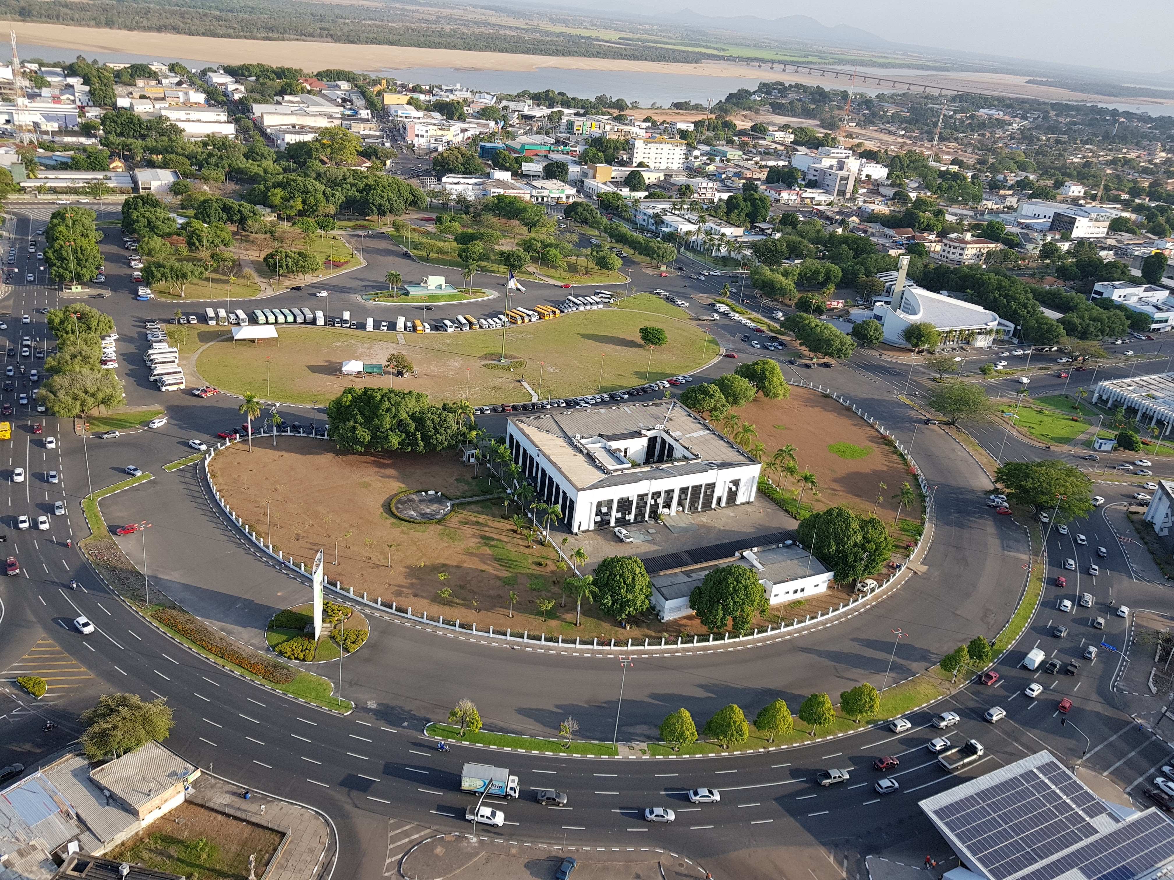 Imagem do Centro Cívico de Boa Vista, Roraima